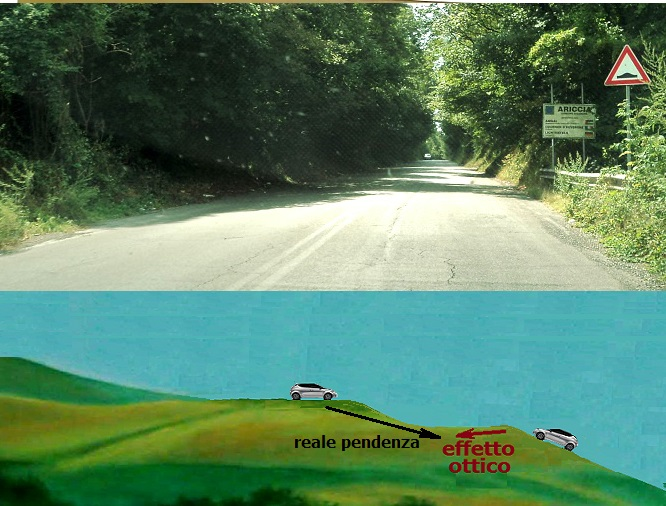 Rilevazioni e studi personali, descrizione della salita, con effetto ottico in discesa, presso Ariccia sulla SP218 a 100 metri dalla la rotonda bivio della SP217 che collega il Lago di Albano con Velletri (Roma).